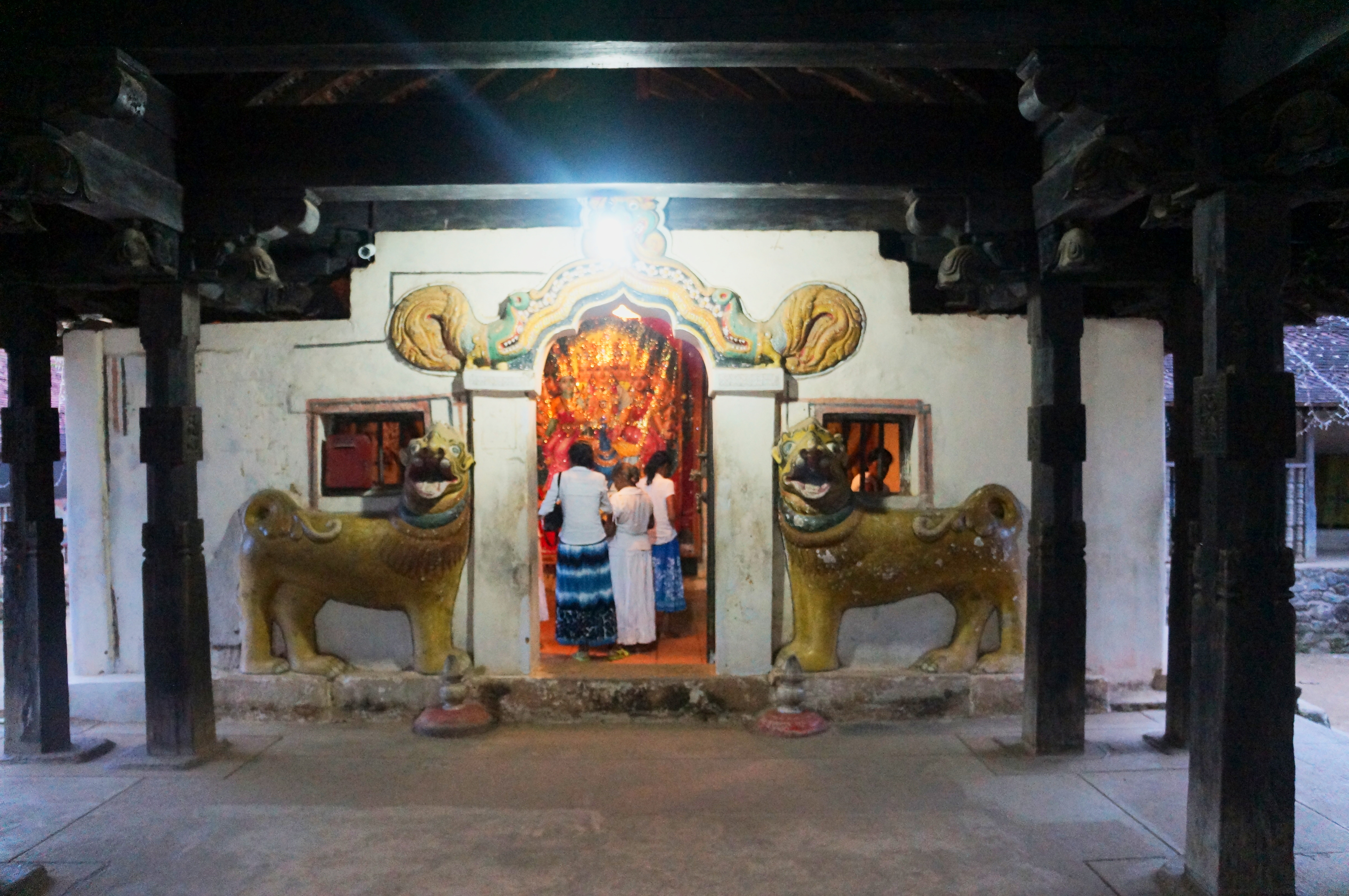 Le temple Embekka Devalaya à Kandy Sri Lanka.- Asie du Sud